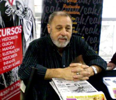 Horacio Lalia, dibujante de comics argentino.